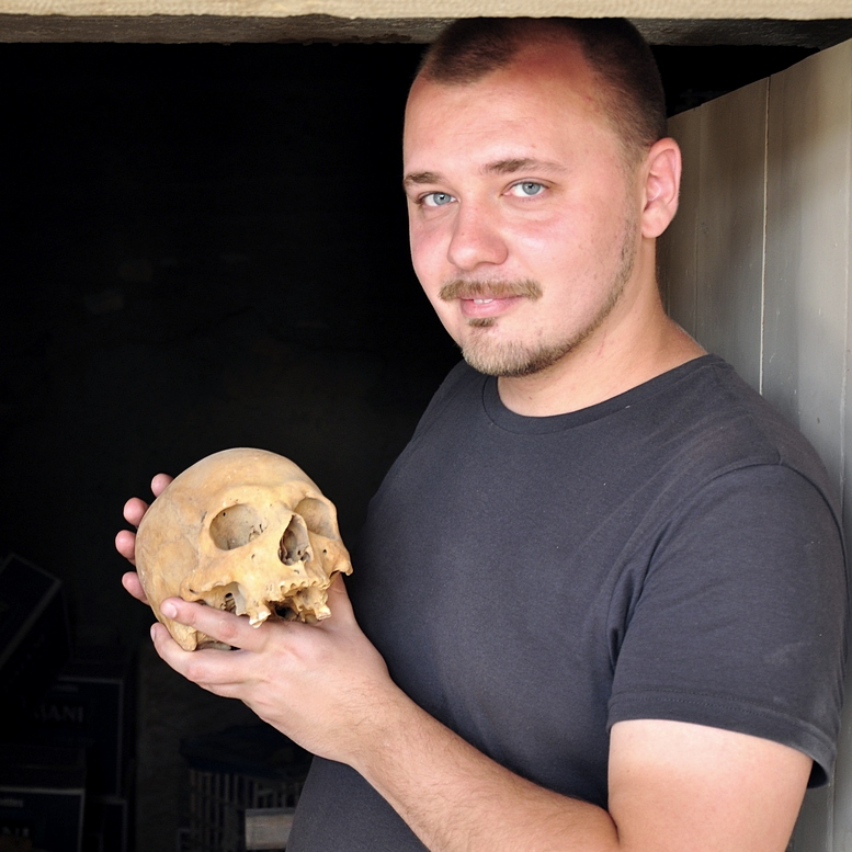 Солкин В.В.